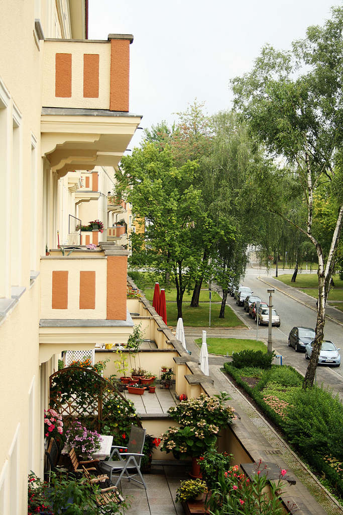 Eisenhüttenstadt, Brandenburg